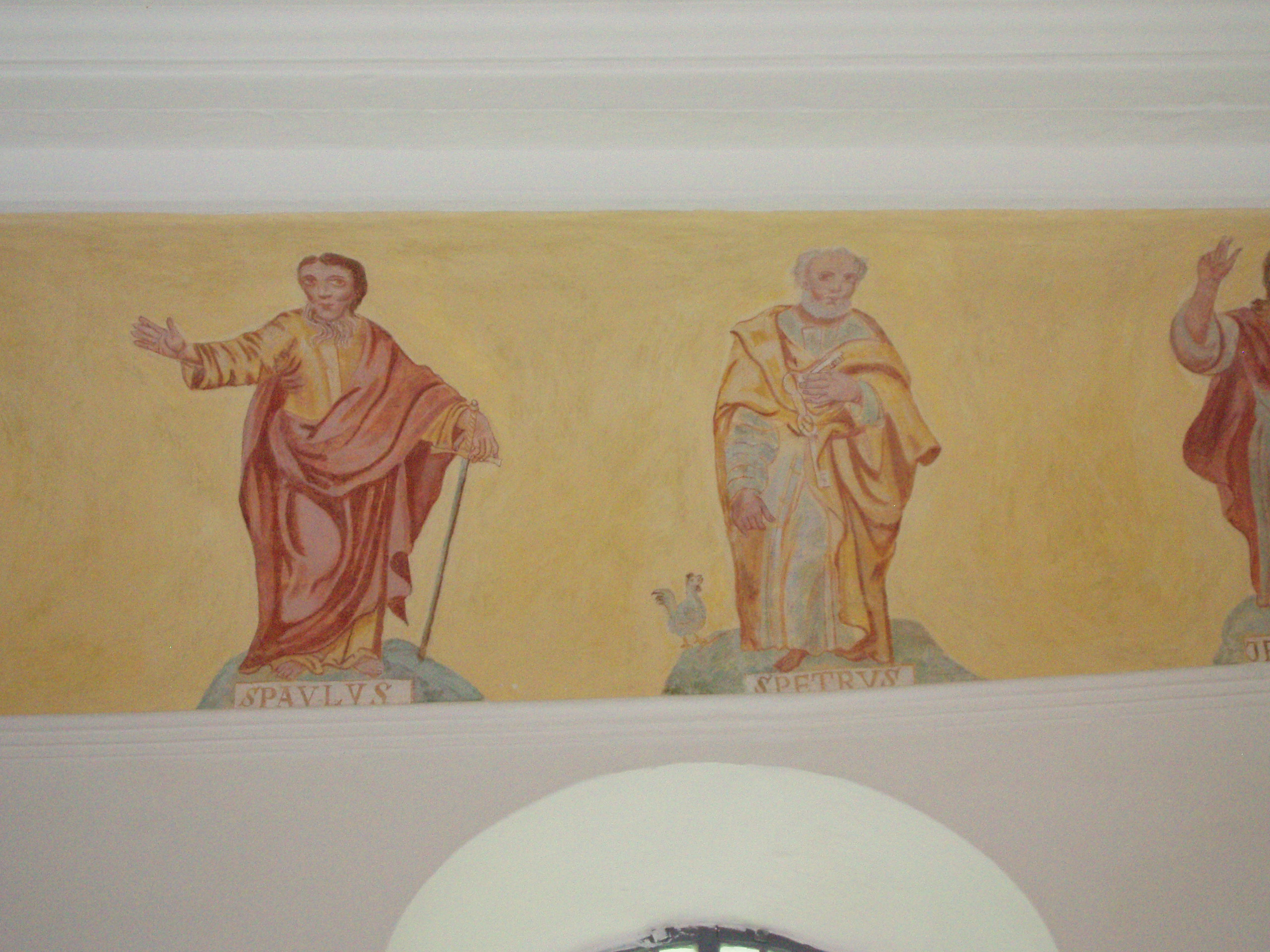 St. Paulus und St. Petrus, Malereien in der Kapelle St. Jakob in Oberjoch